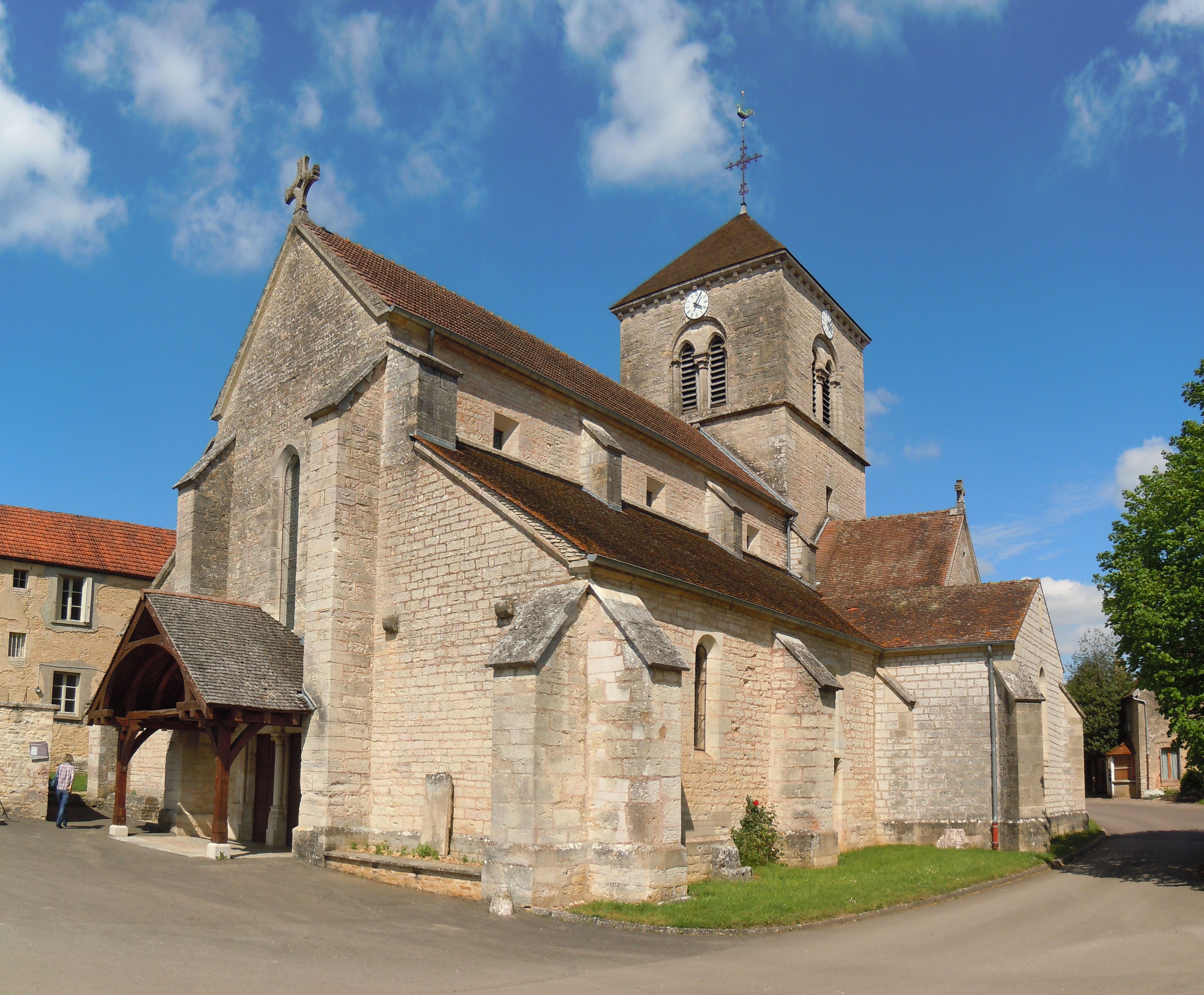 Église Saint-Jean-Baptiste de Fleurey-sur-Ouche